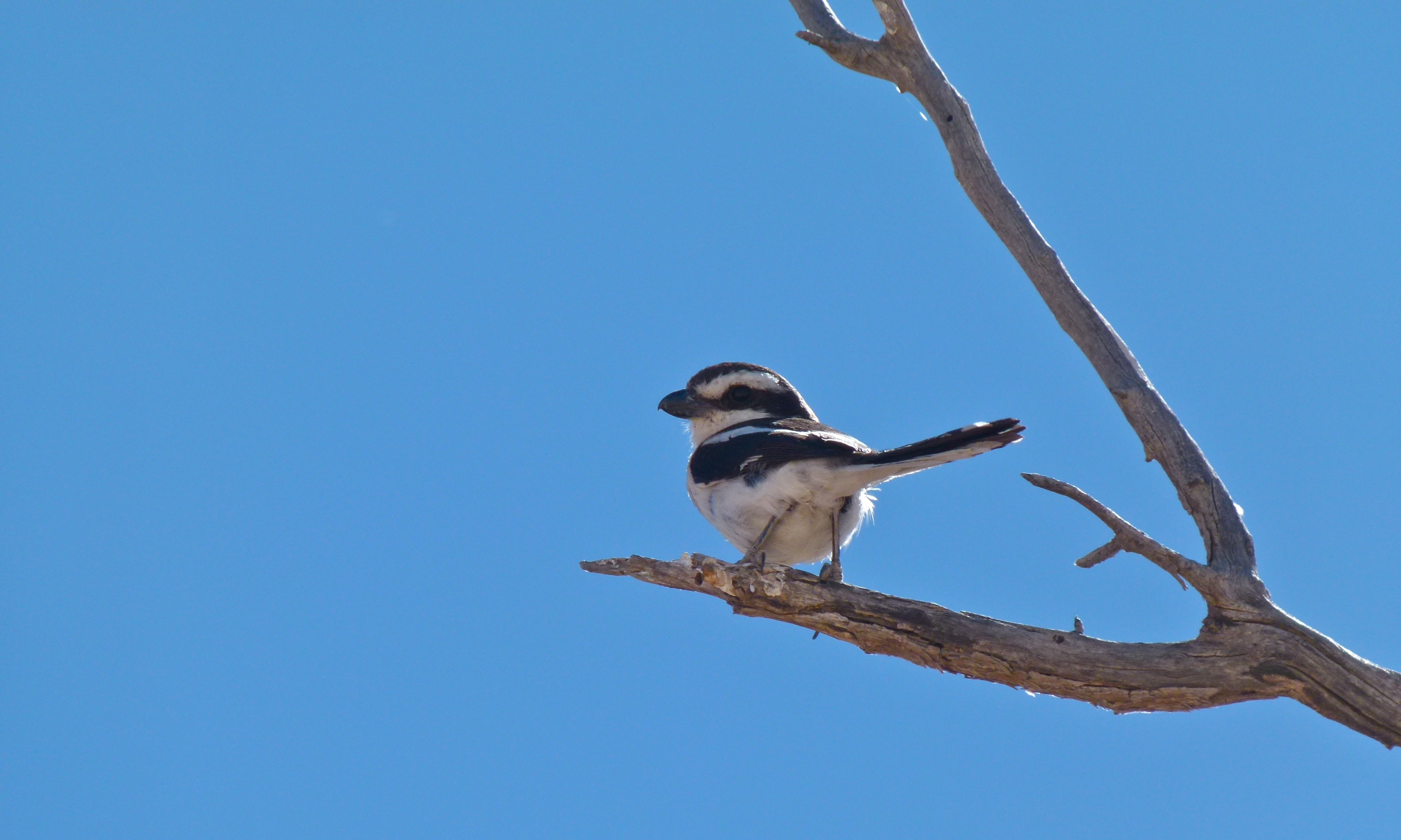 Auob Riverbed, Kgalagadi Transfrontier Park, SOUTH AFRICA